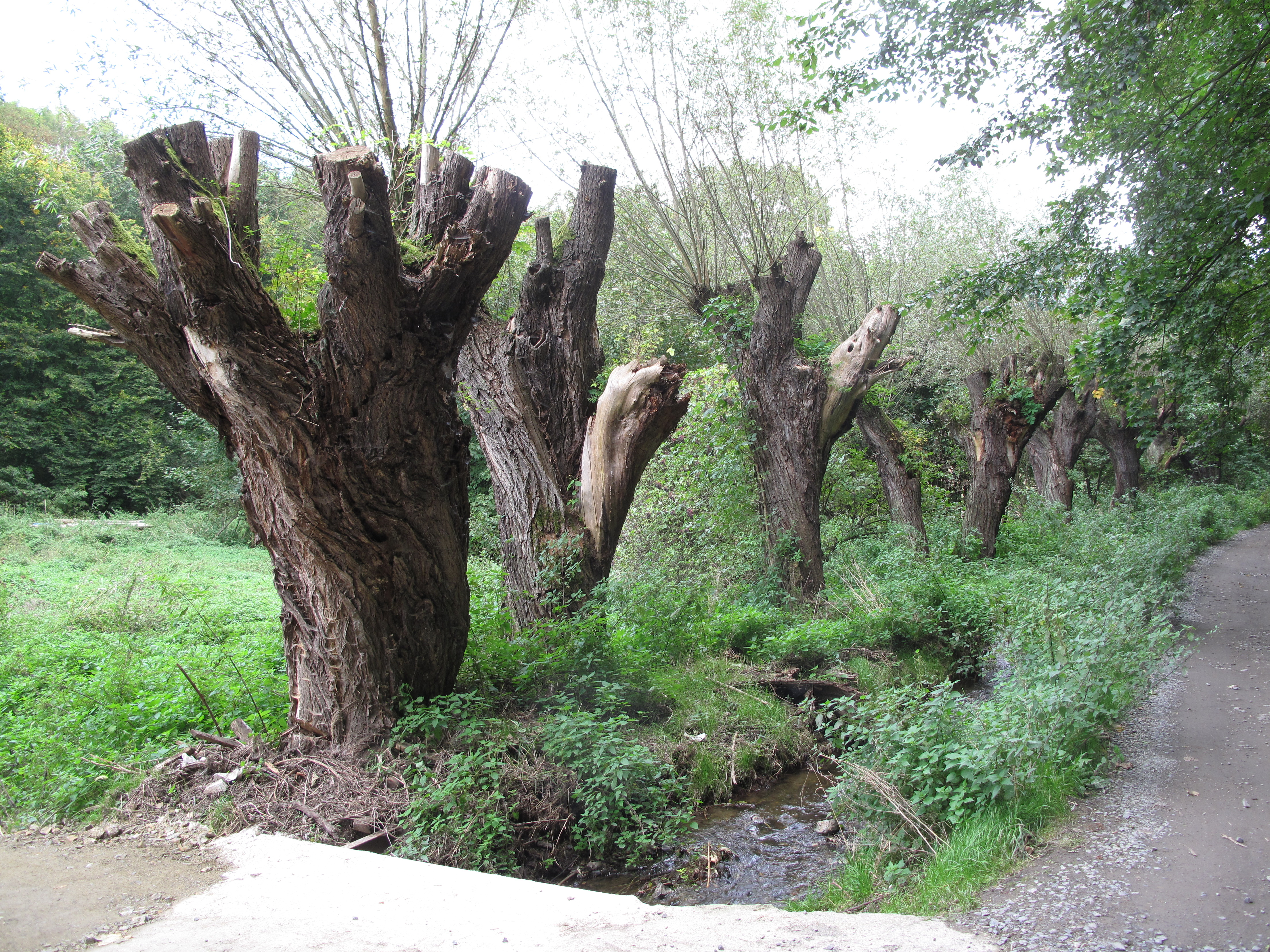 Drahanské údolí a Drahanský potok